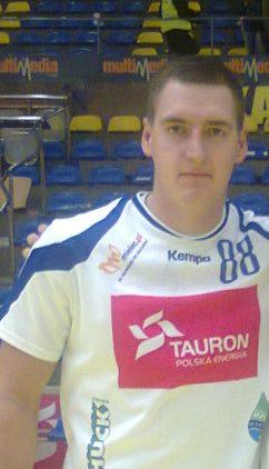 Damian Kostrzewa